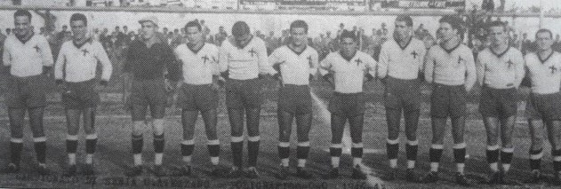 La formazione della Forza e Coraggio che nel 1946-1947 affrontò il Poligrafico Roma (0-0)